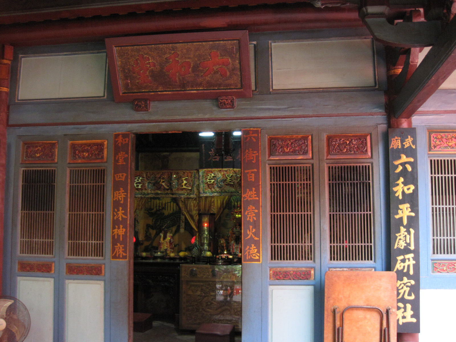 中文（台灣）: 臺南市祀典武廟的六和堂